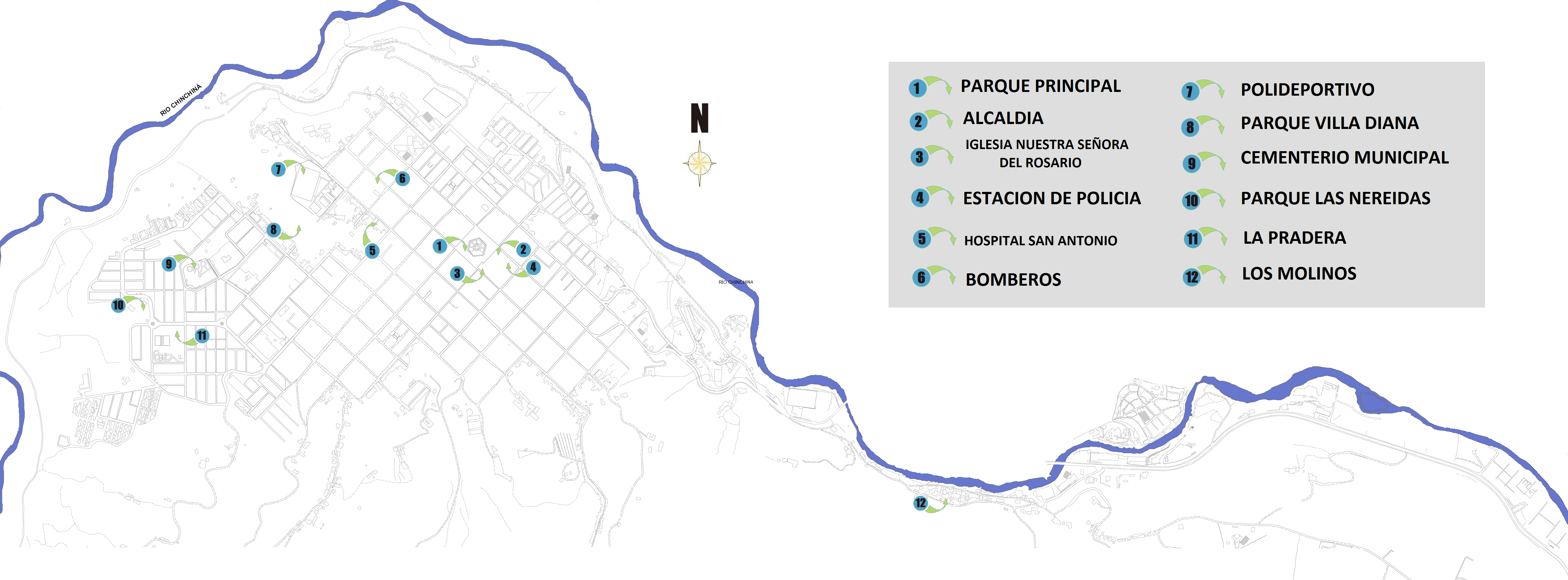 mapa urbano del municipio de Villamaria